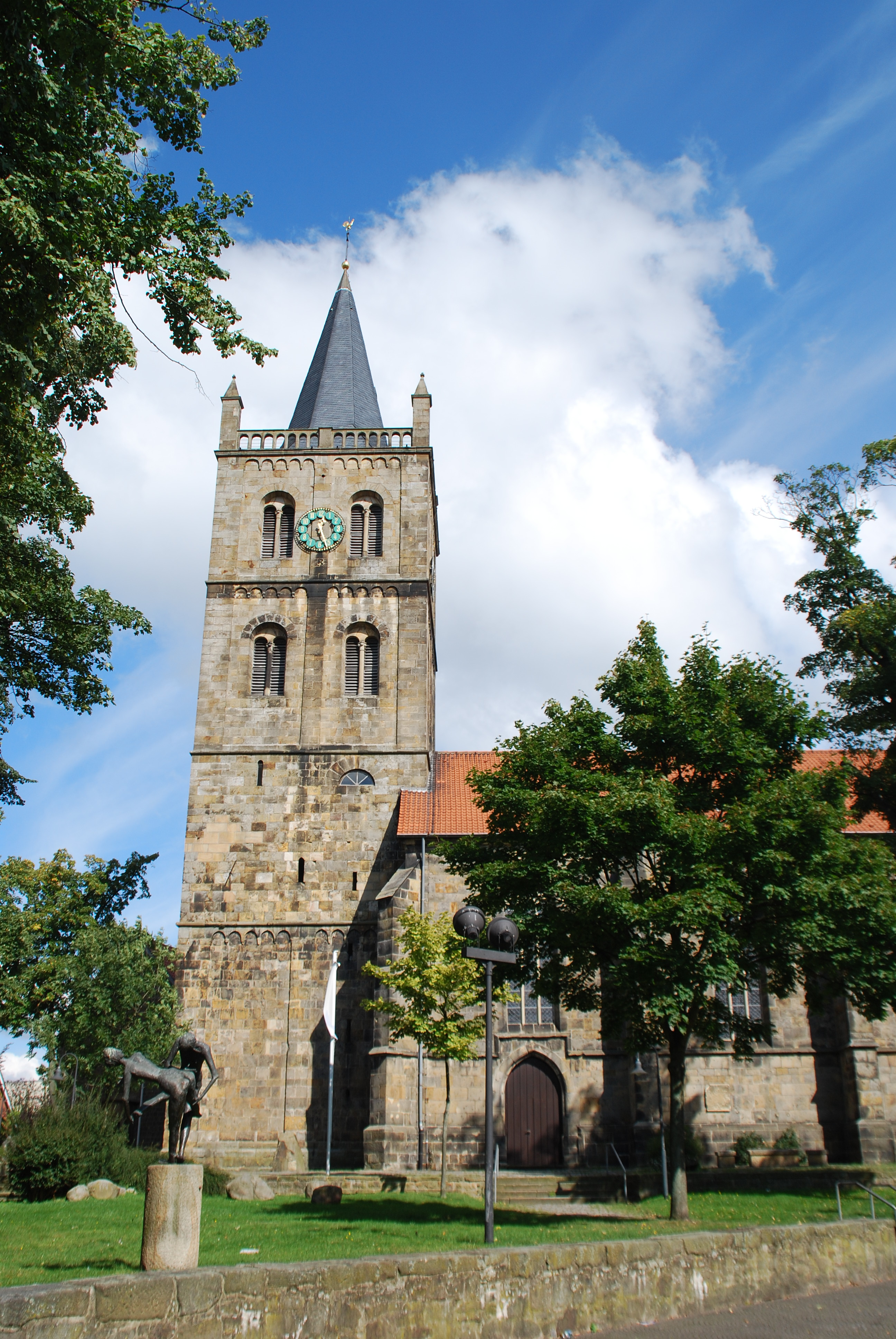 Christuskirche Ibbenbüren This image shows a heritage building in Germany, located in the North Rhine-Westphalian city Ibbenbüren (no. A 001).